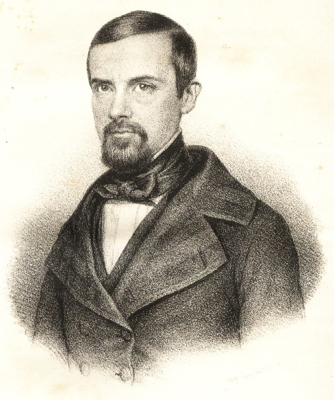 Retrato_de_Buenaventura_de_Córdoba. Tomo IV. 1845